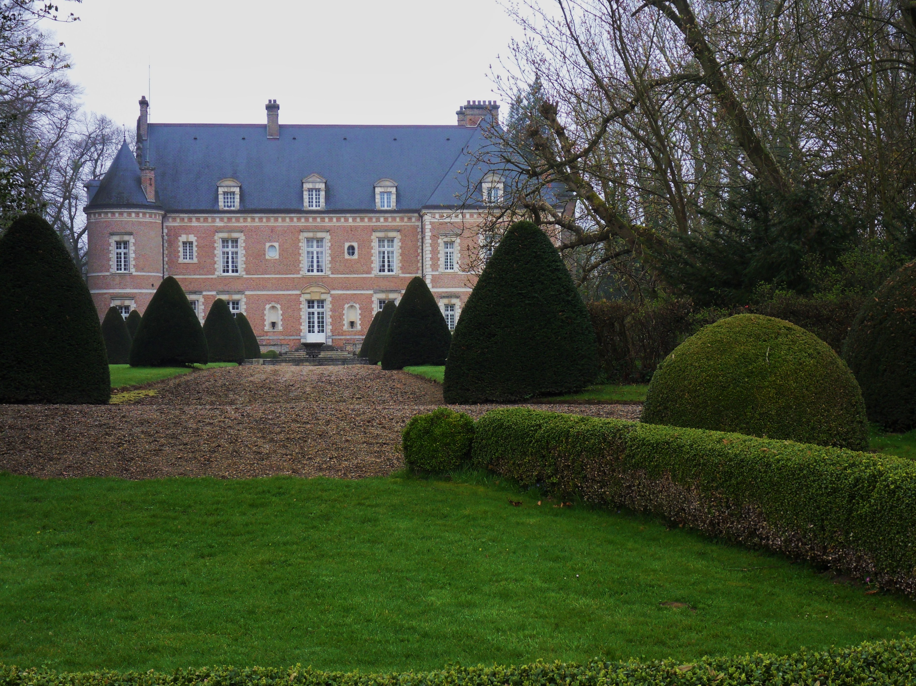 Huppy (Somme, France). Le château.